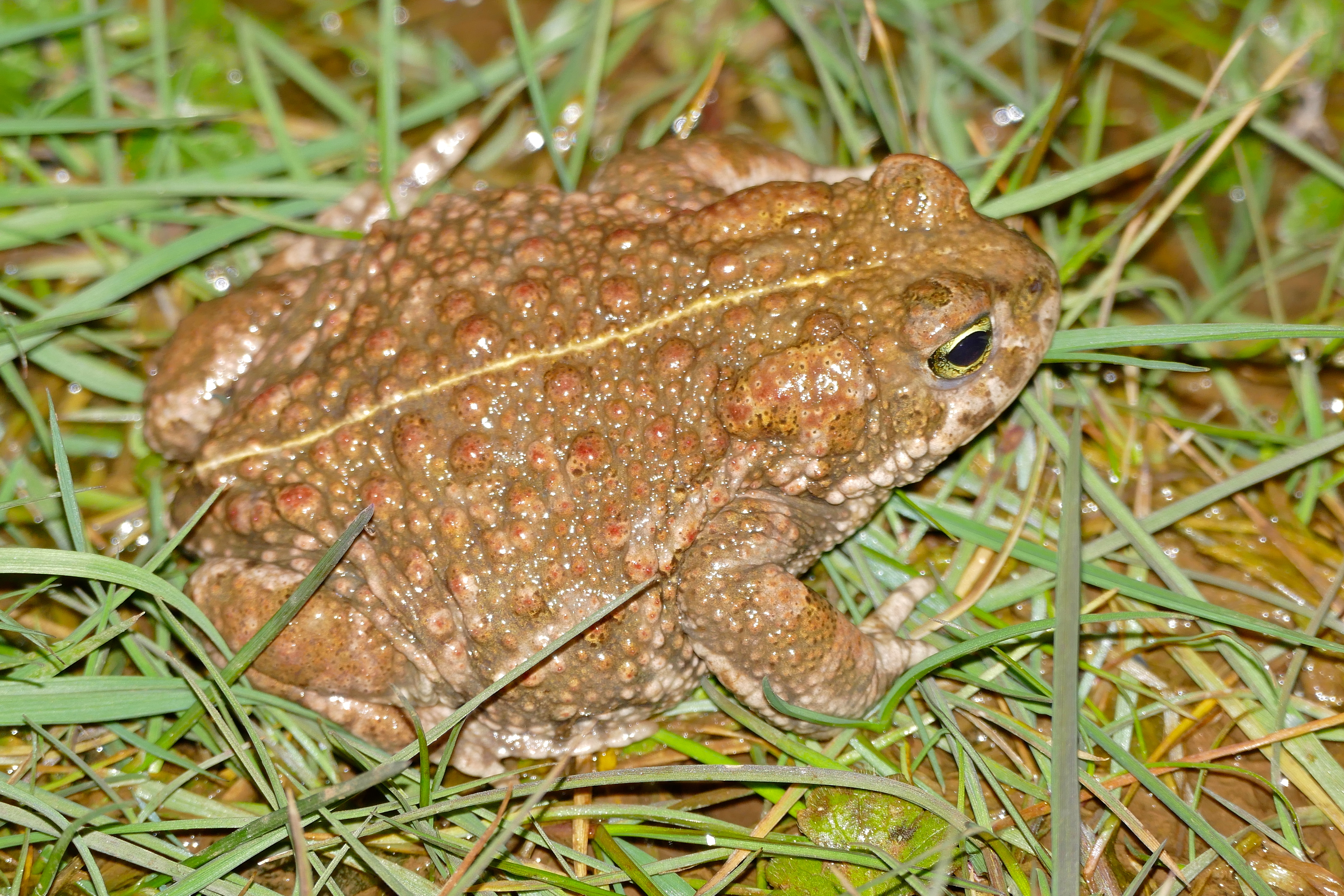 Lac des Rives, Les Rives, Hérault, FRANCE